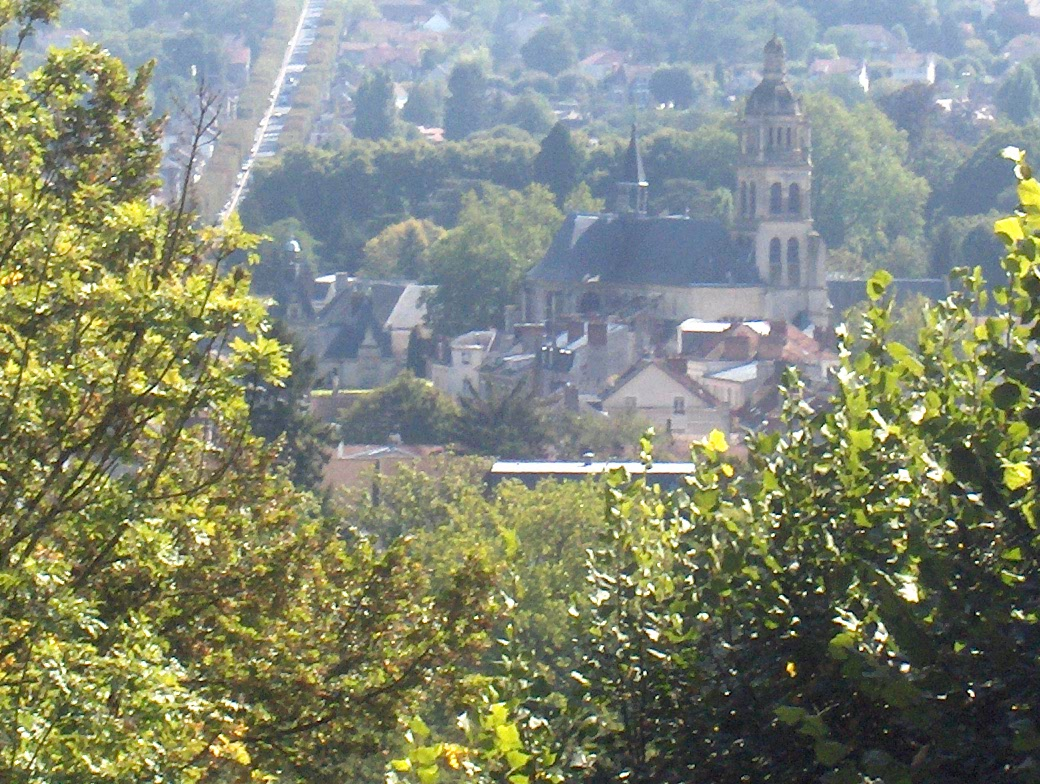 Vue de L'Isle-Adam depuis les hauteurs de Parmain